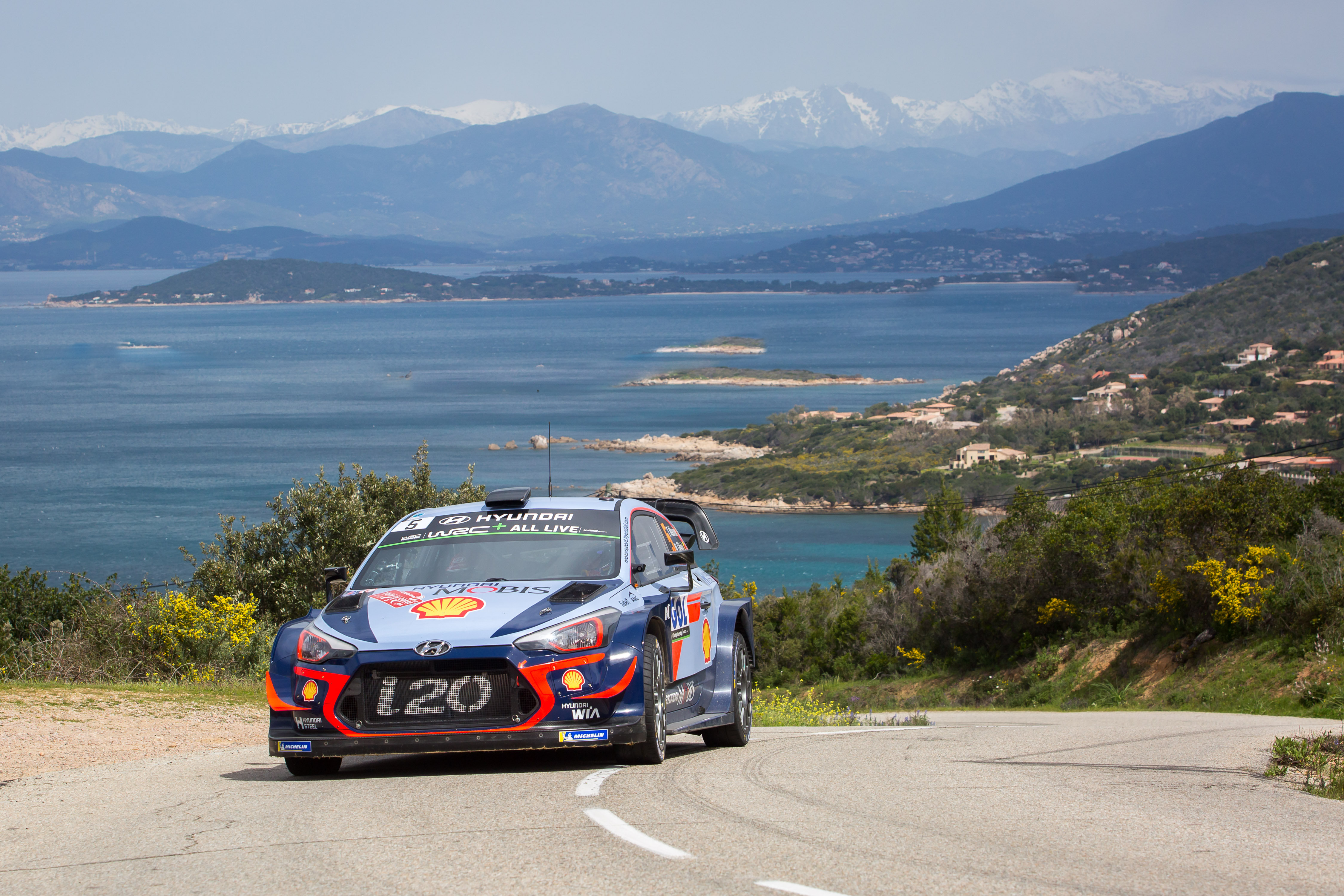 Rajd Korsyki 2018 Thierry Neuville i Nicolas Gilsoul prowadzący Hyundaia i20 Coupe WRC